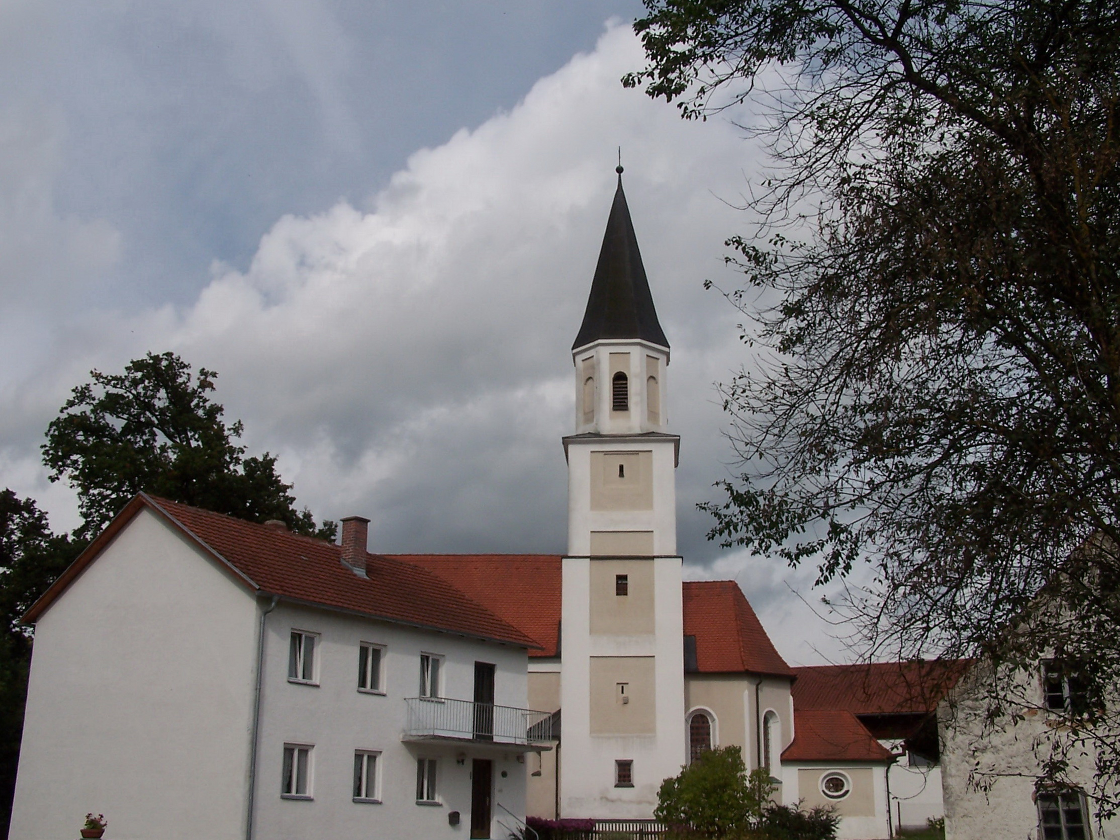 Rottenburg an der Laaber. Niederhatzkofen, Sankt-Margareta-Gasse 1. Filialkirche St. Margaretha. Chor im Kern spätgotisch, Langhaus 1. Hälfte 18. Jahrhundert; mit Ausstattung.